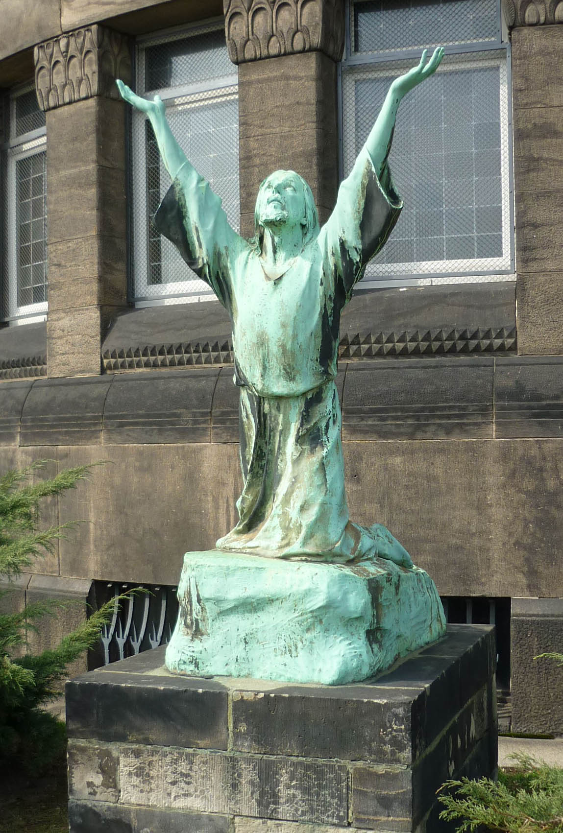 Christus-Skulptur: Christus in Gethsemane von Friedrich Hecht an der Christuskirche in Dresden-Strehlen